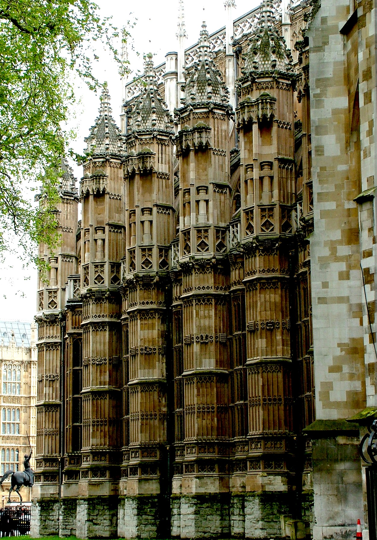 Westminster-apátság, a Lady-Chapel (VII. György k.) oldalfalainak jellegzetes íves pillérformái (London, Egyesült Királyság)